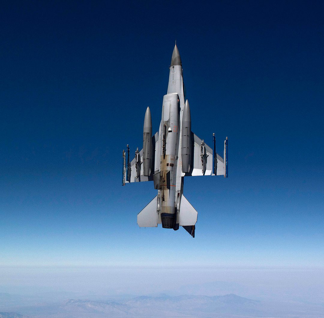 F-16 bottom side.